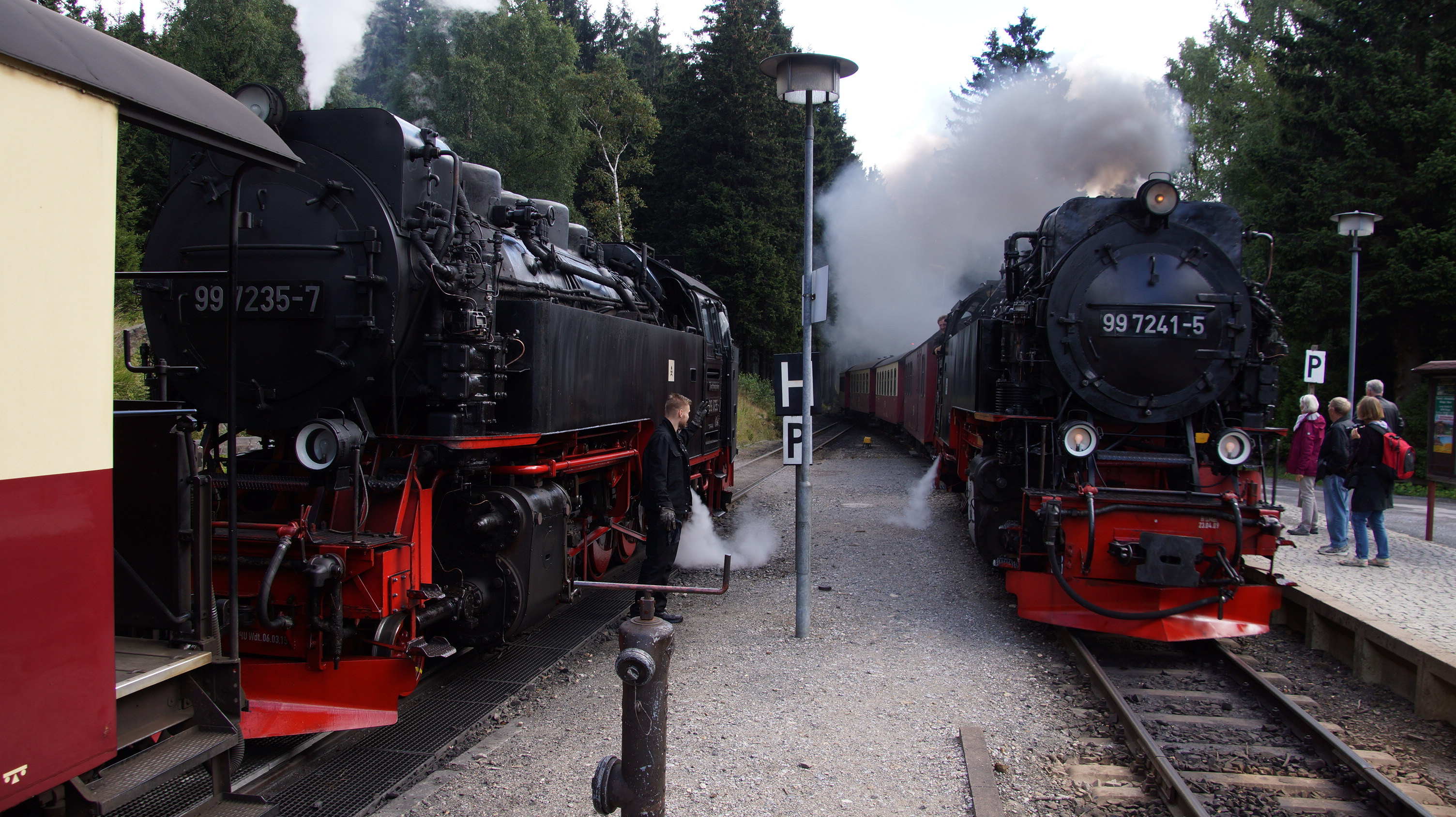 Brockenbahn der Harzer Schmalspurbahnen im Bahnhof Schierke: Dampfloks 99 7235-7 und 99 7241-5